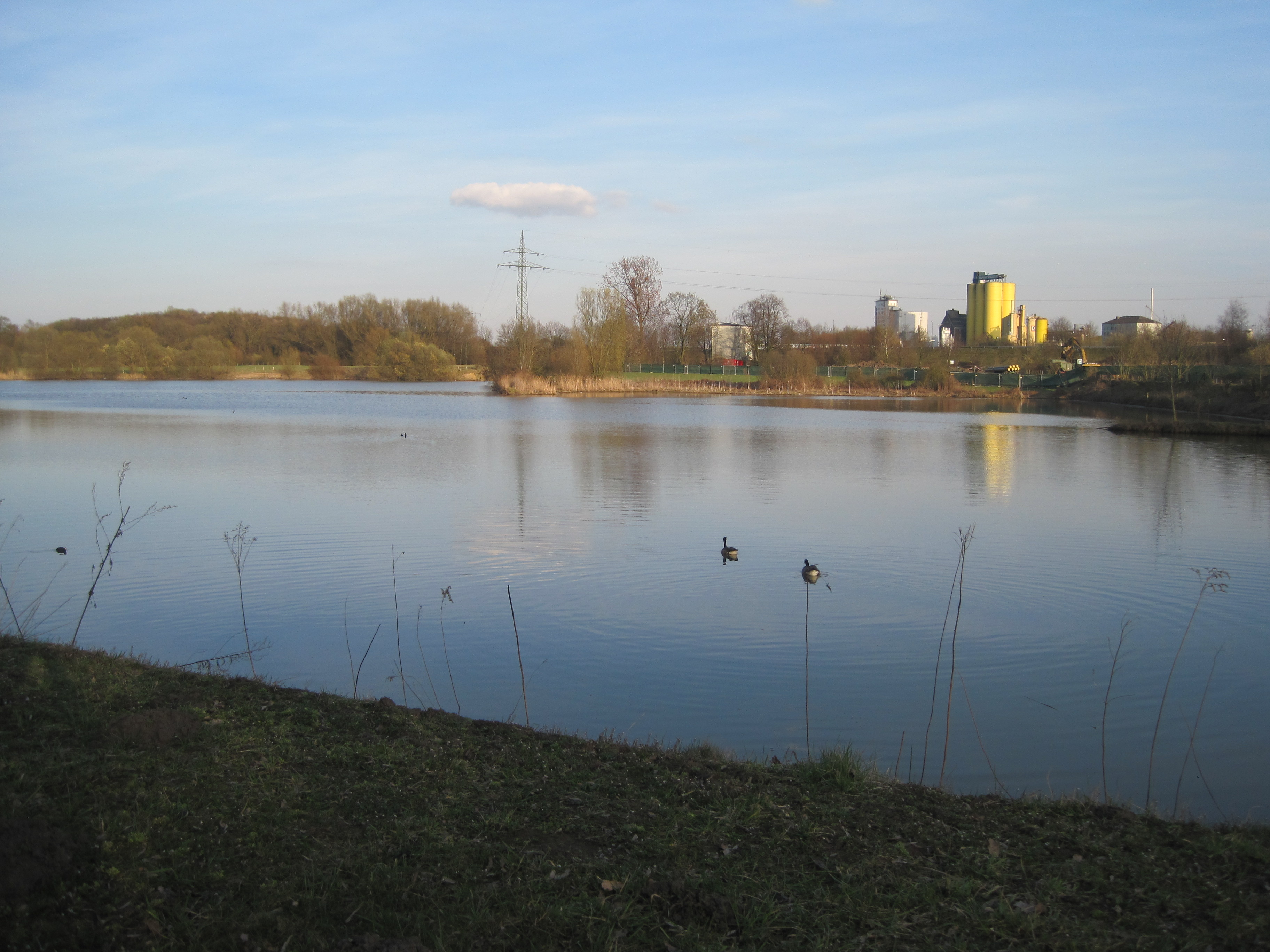 Das Foto zeigt den Radbodsee in Hamm-Bockum-Hövel.